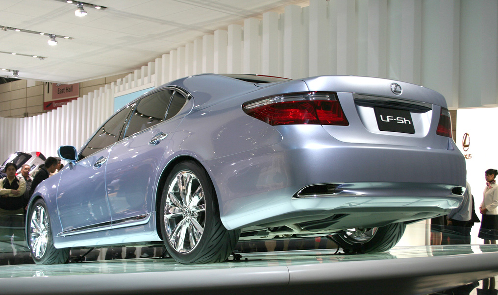 Lexus LF-Sh